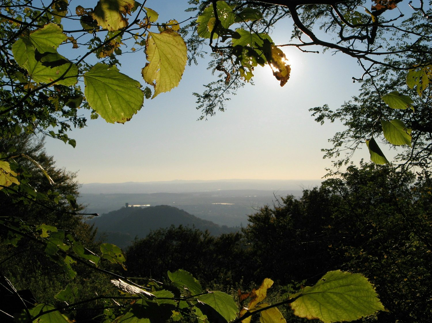 Blick vom Oelberg auf den Drachenfels (Siebengebirge)